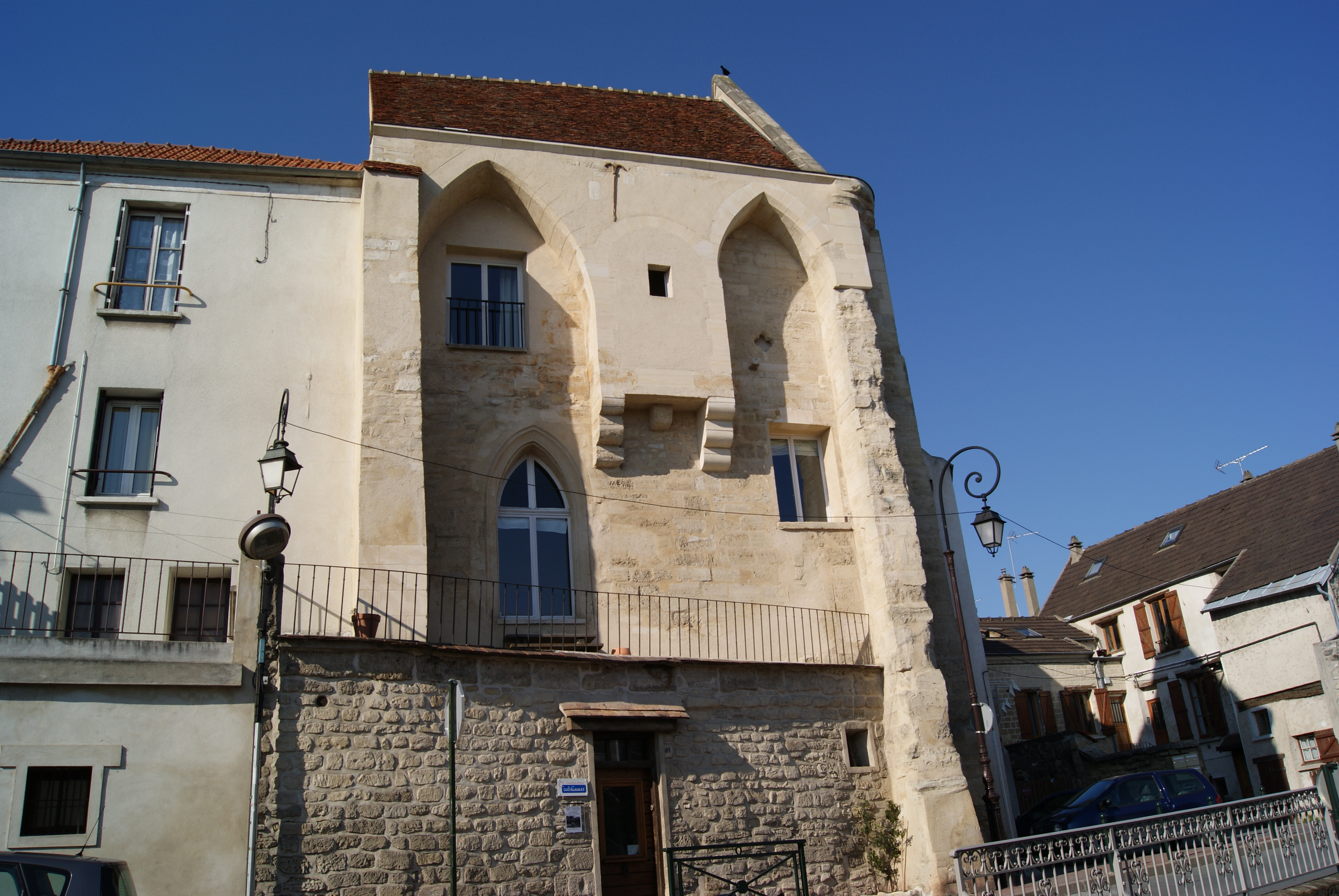 Immeuble de l'Abbaye à Carrières-sur-Seine, vu du haut de la rue de Bezons. .